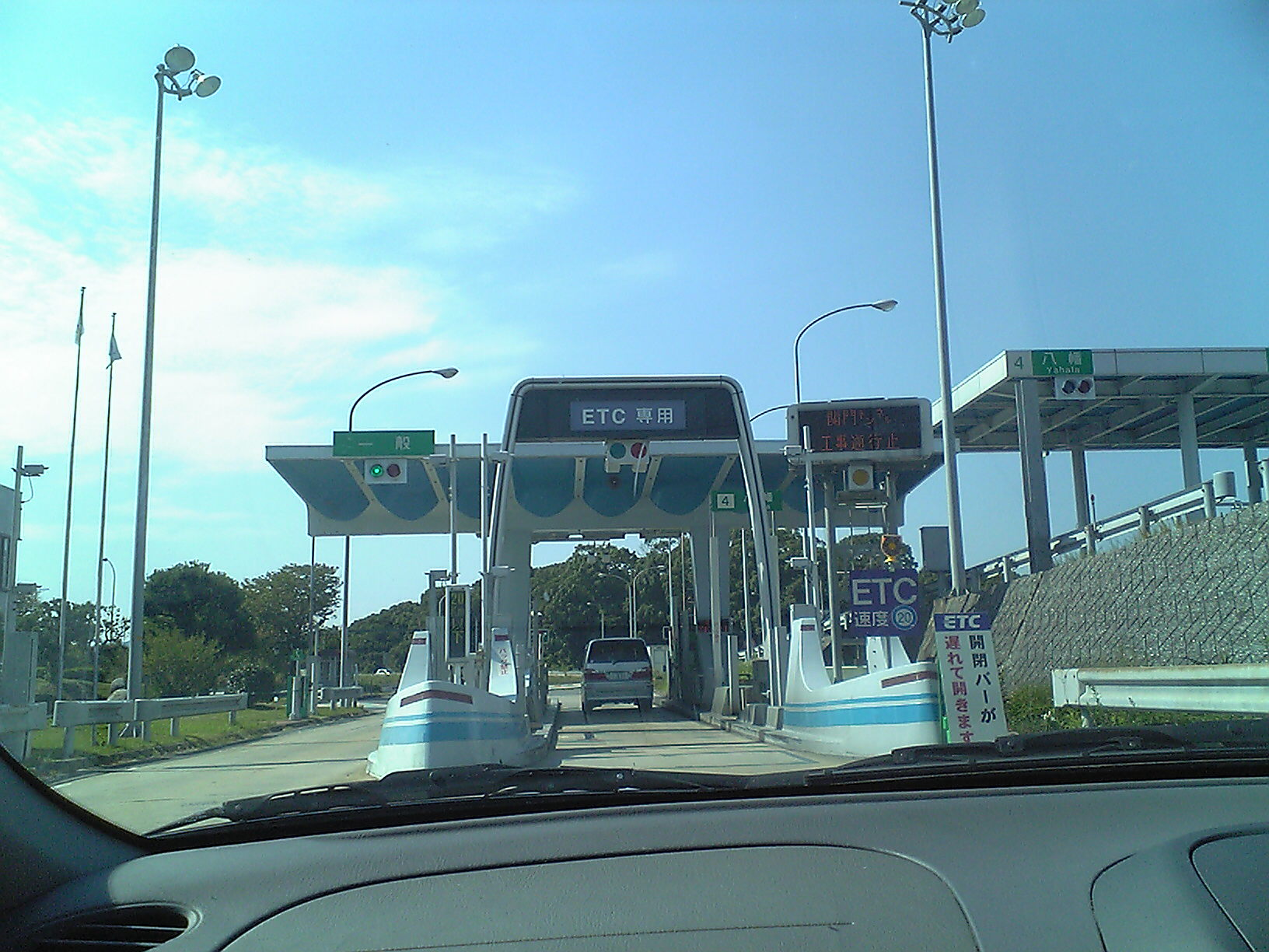 福岡県北九州市八幡西区の八幡インターチェンジ入口（福岡方面）